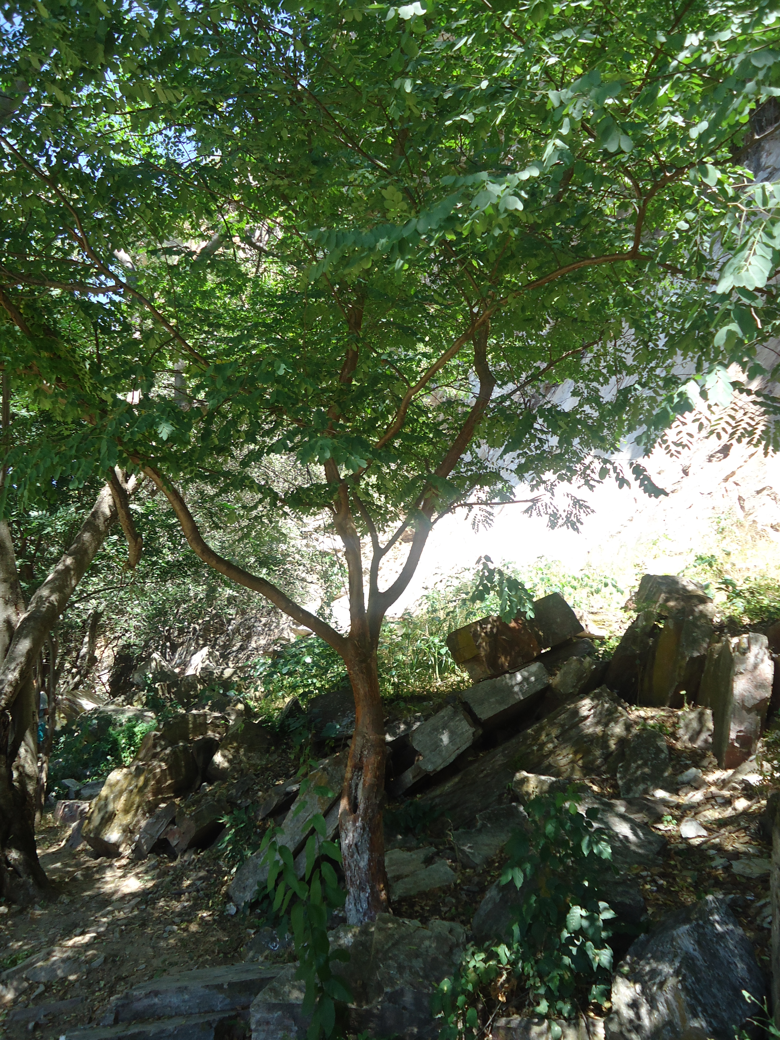 Planta arborescente cumaru-nordestino, cresce principalmente na caatinga e no cerrado.